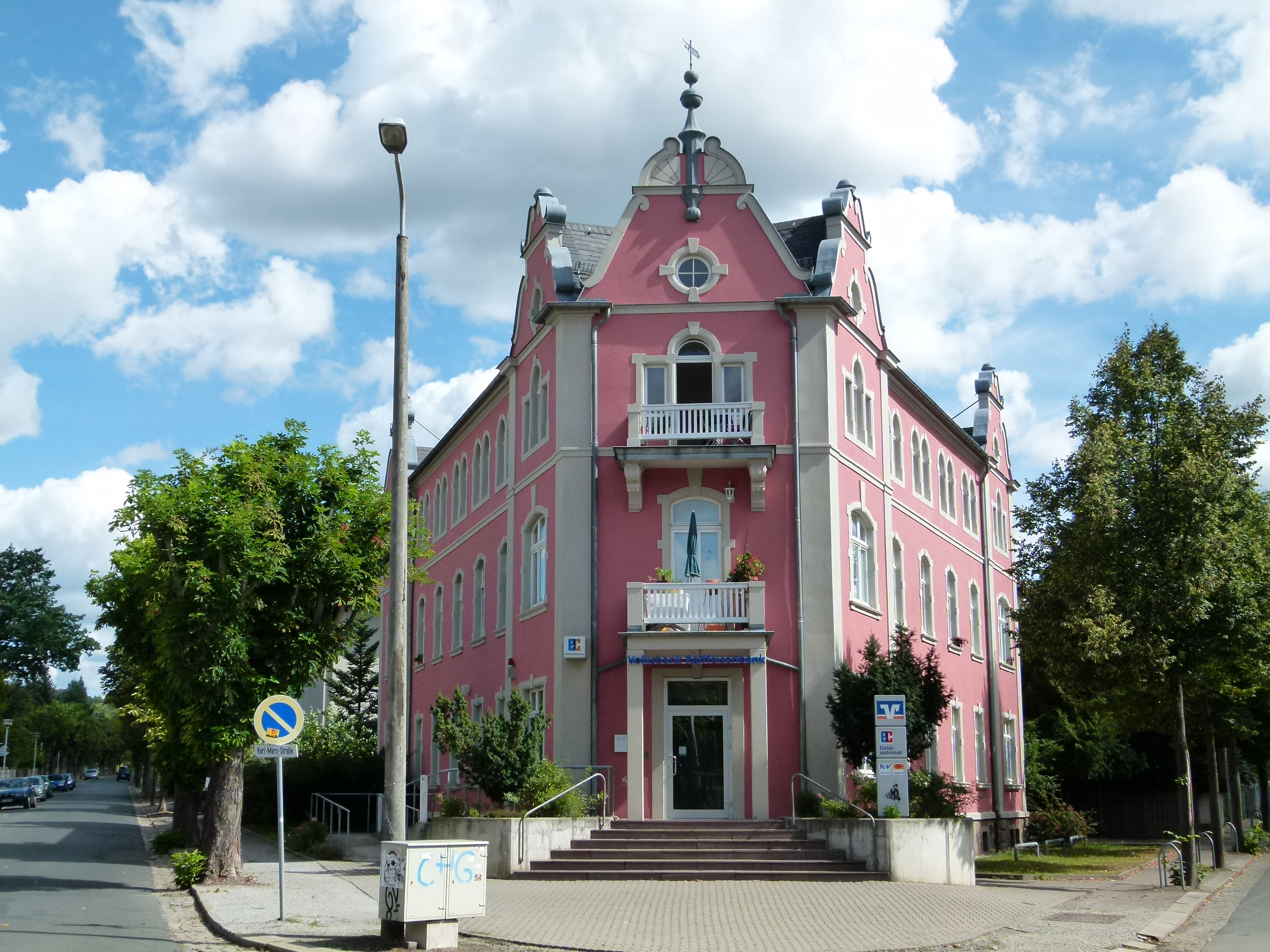 Denkmalgeschütztes Haus, Karl-Marx-Straße 1, Radebeul, Sachsen